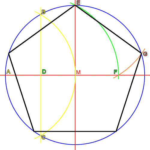 Anleitung zur Konstruktion eines Fünfecks in einen umschließenden Kreis RobbyBer hat mich darauf hingewiesen eine Freigabelizenz anzugeben. Da ich nicht weiß wo, mache ich es hier. Das Bild habe ich selber gezeichnet und Jeder darf es frei verwenden.